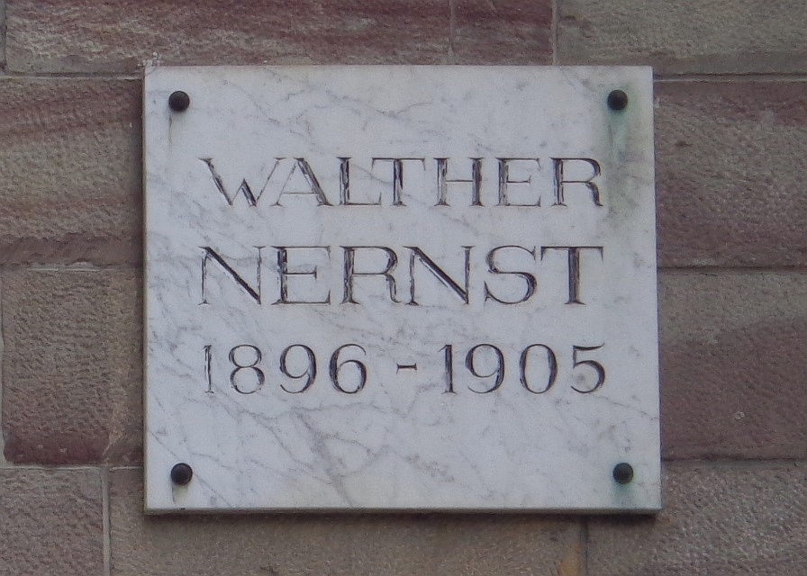 Göttinger Gedenktafel für Walther Nernst, Physiker und Chemiker, Nobelpreisträger (Bürgerstraße 50)